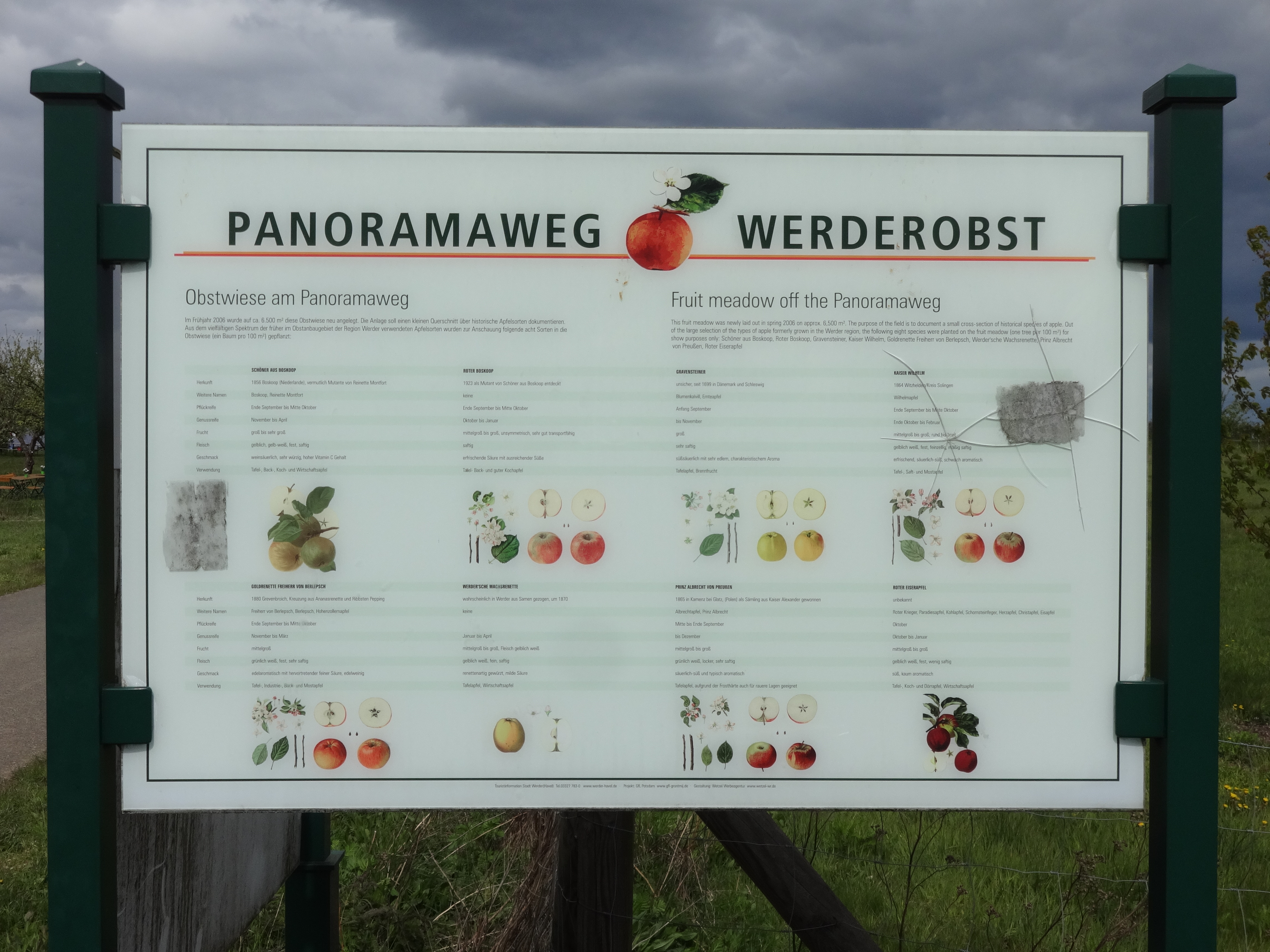 Der Panoramaweg Werderobst ist ein rund 15 Kilometer langer Lehrpfad in der Region um Werder (Havel) im Land Brandenburg. Er erschließt die Hochfläche der Zauche. mehreren Schautafeln wird insbesondere auf den Stellenwert des Obstanbaus für die Region hingewiesen.